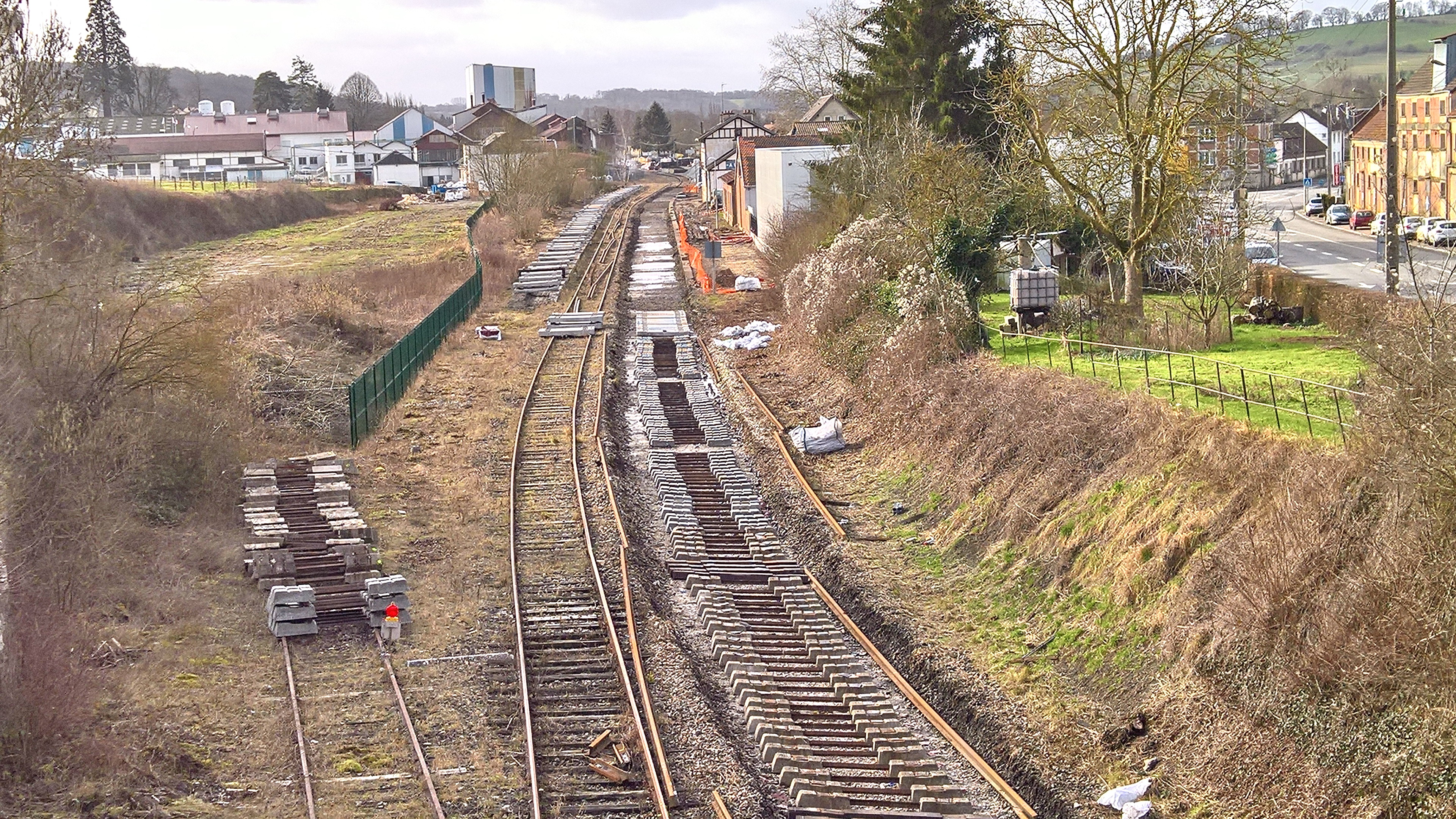 Gare d'Aumale lors des travaux de réfection de la ligne Beauvais-Le Tréport